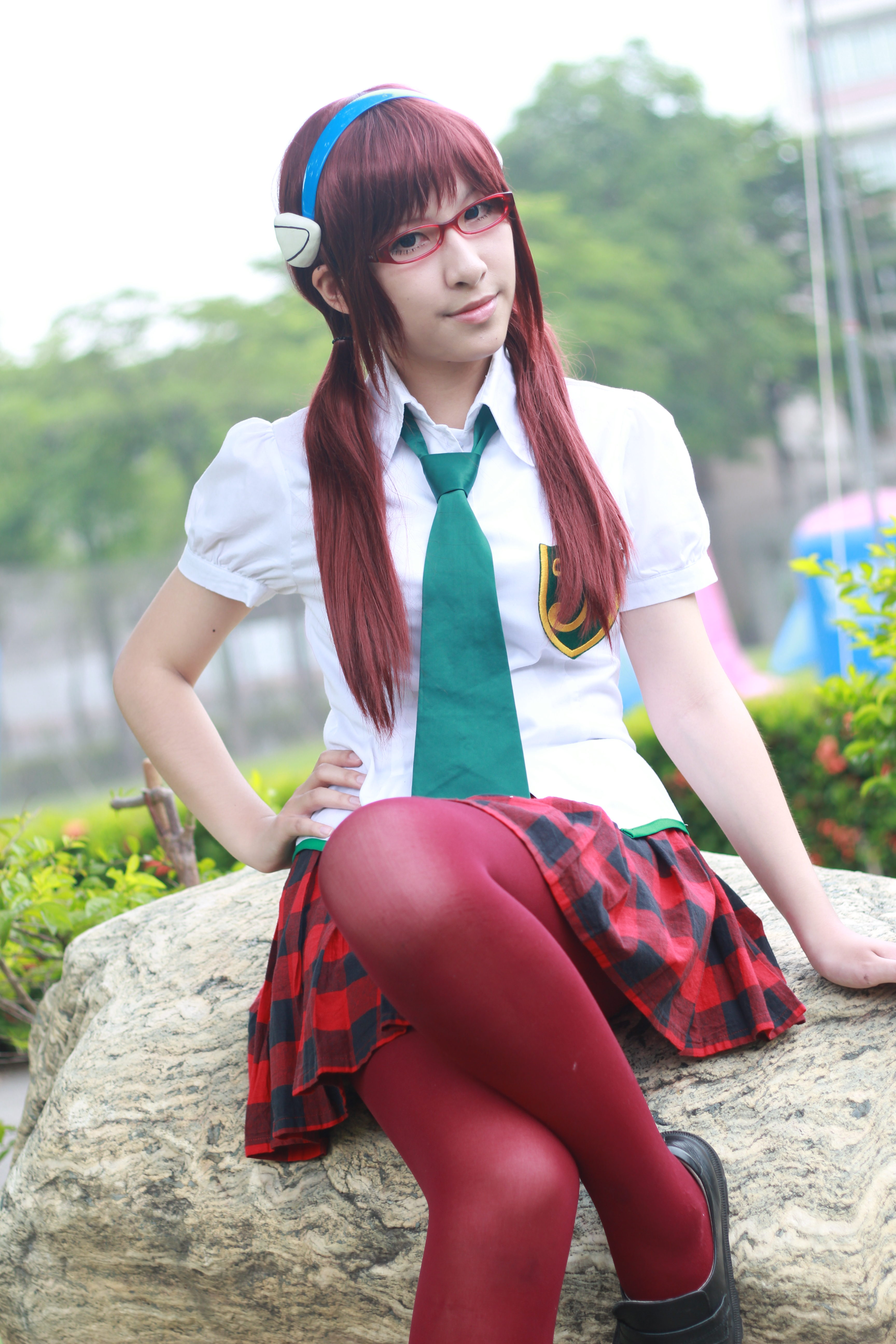 第4屆高雄高中職聯合動漫展（KSACG4），《新世紀福音戰士》真希波·真理·伊拉絲多莉亞斯cosplayer。